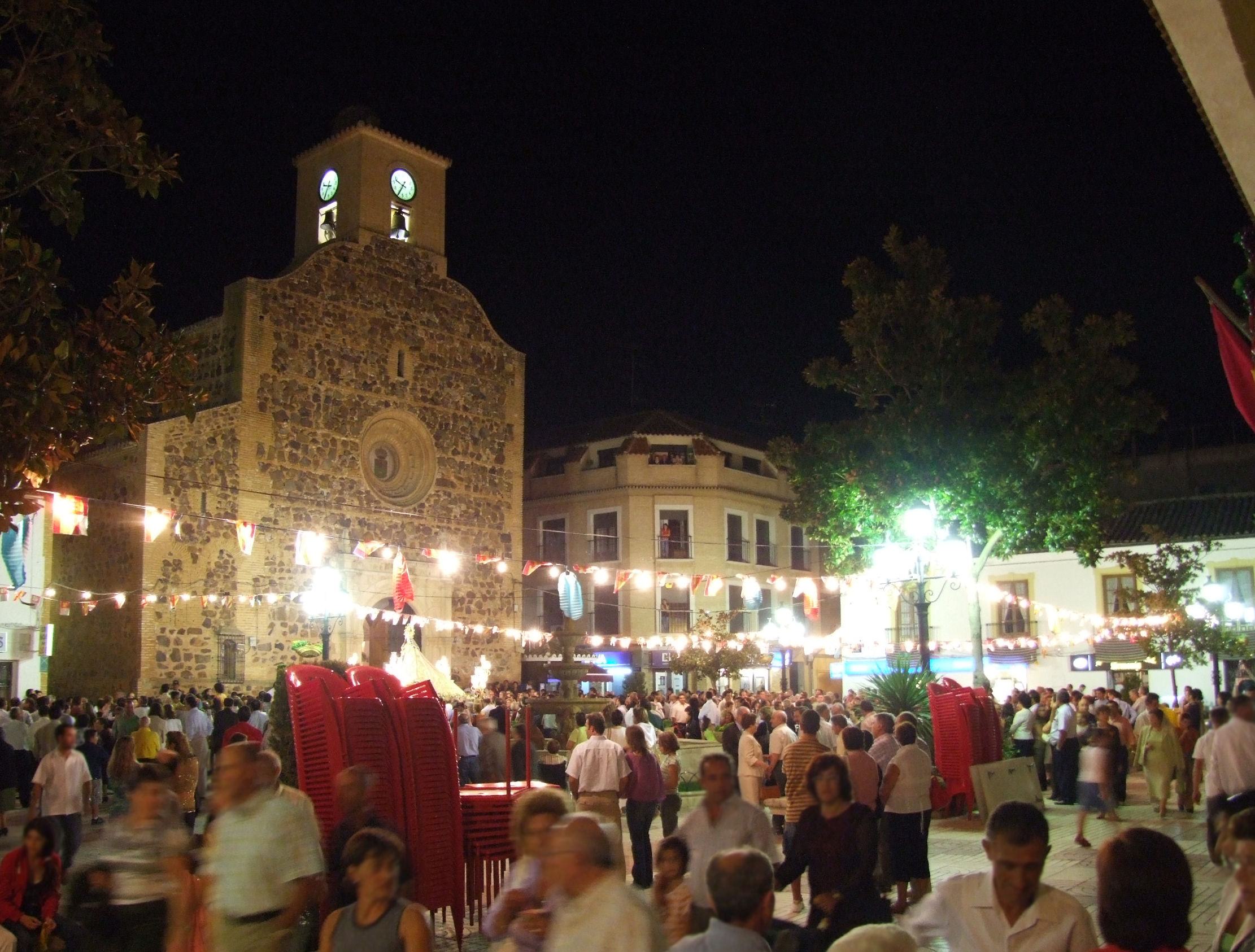 Aspecto de plz España en las fiestas patronales del Santo Cristo (al fondo San Felipe y Santiago)